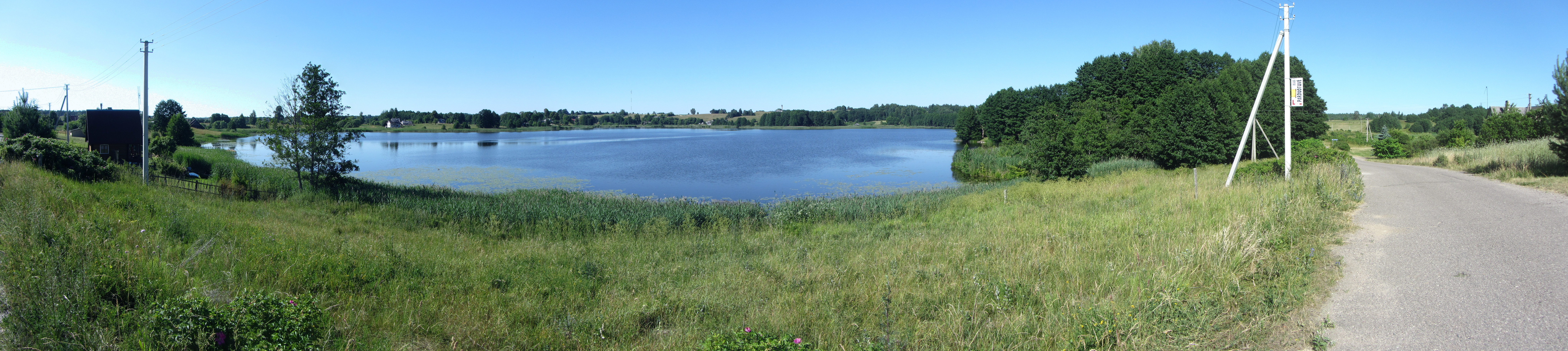 Čižiūnai 21268, Lithuania